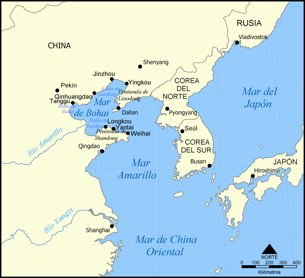 Localización del Mar de Bohai. Mapa del Mar de Bohai (China), en castellano.